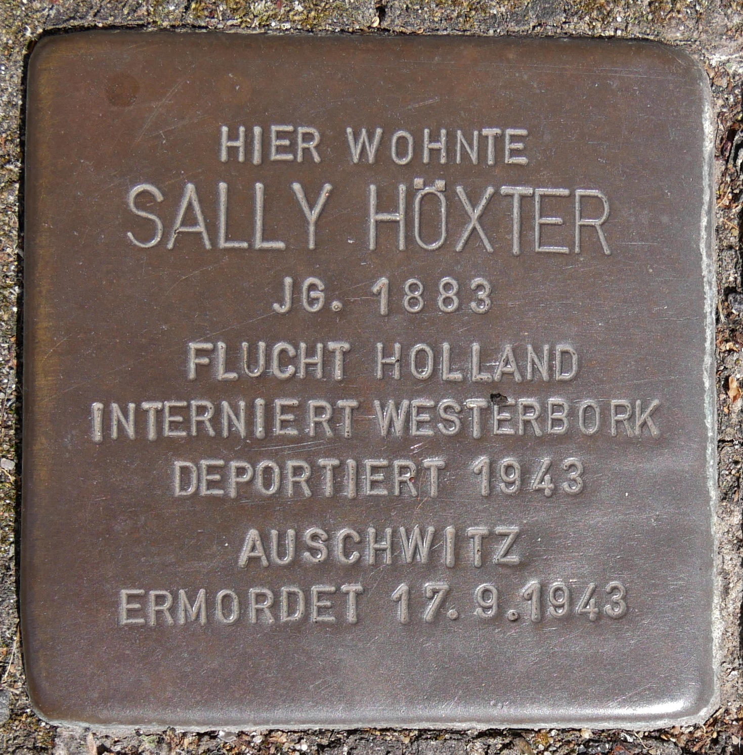 Stolpersteine Wesel: Höxter, Sally